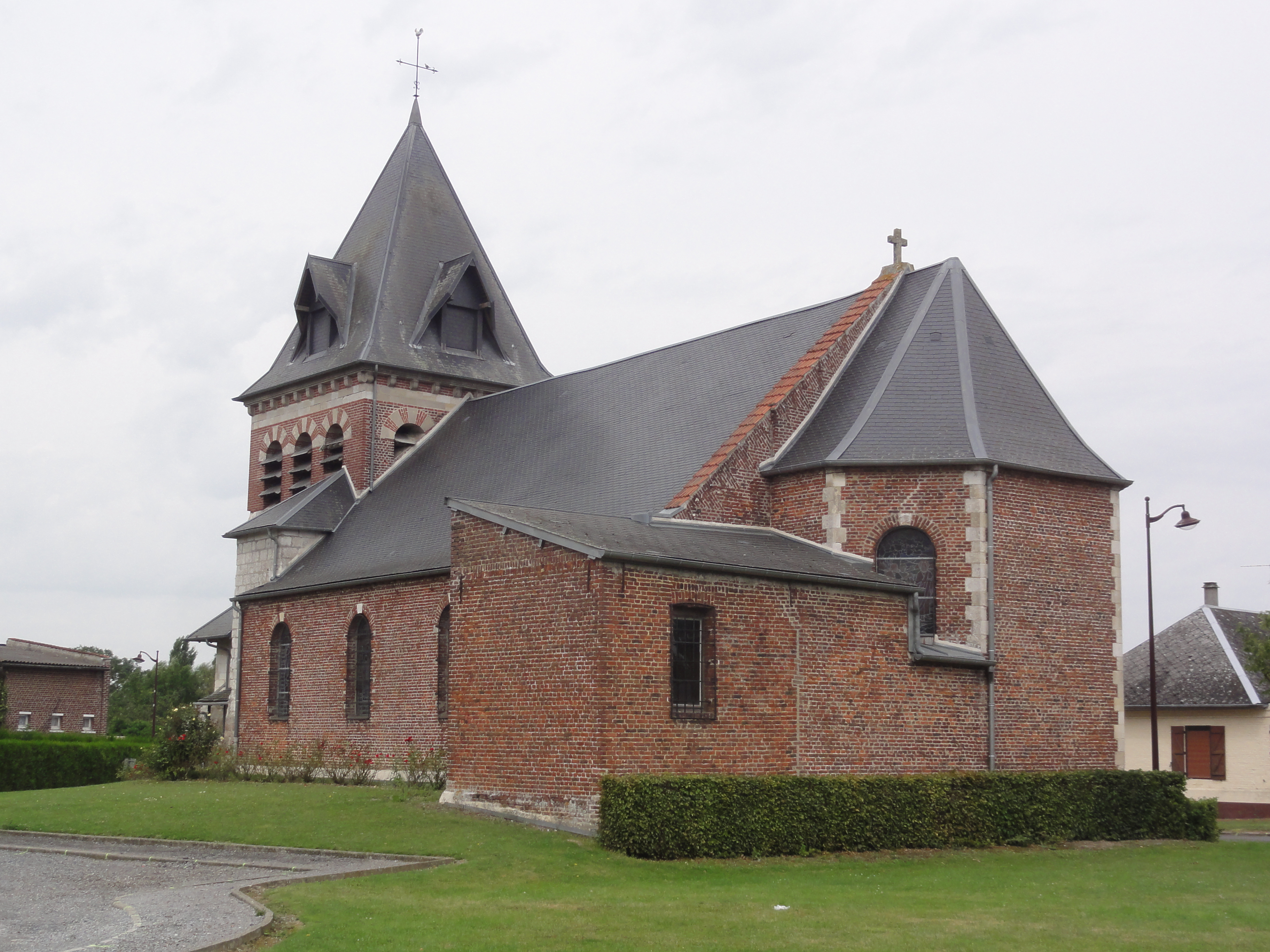 Étaves-et-Bocquiaux (Aisne) église